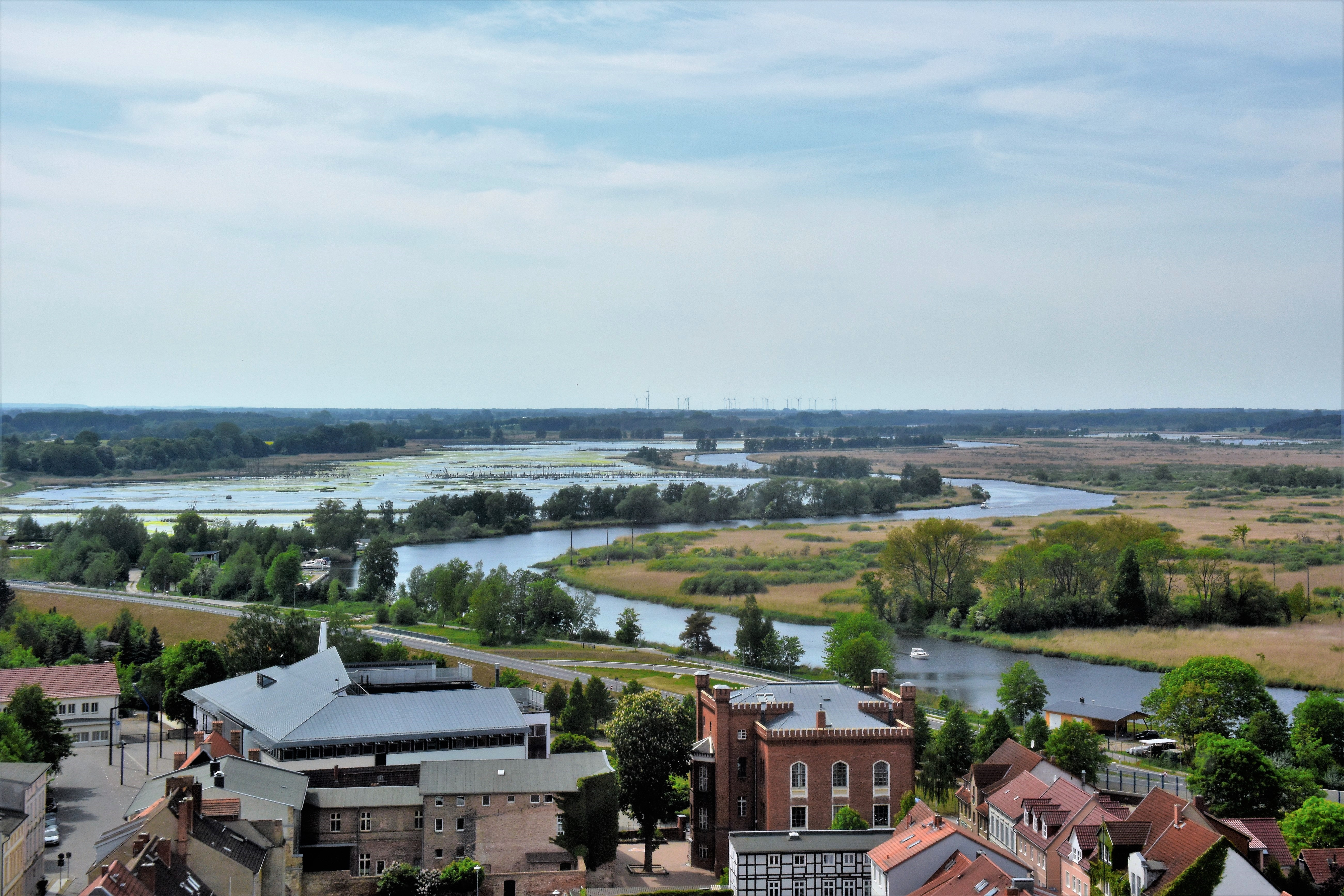 Blick von dem Turm der Nikolaikirche in Anklam auf das Peenetal in Richtung Westen